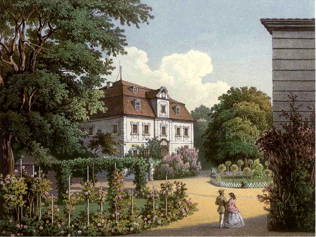 Rittergut Pantzkau, Kreis Striegau Provinz Schlesien